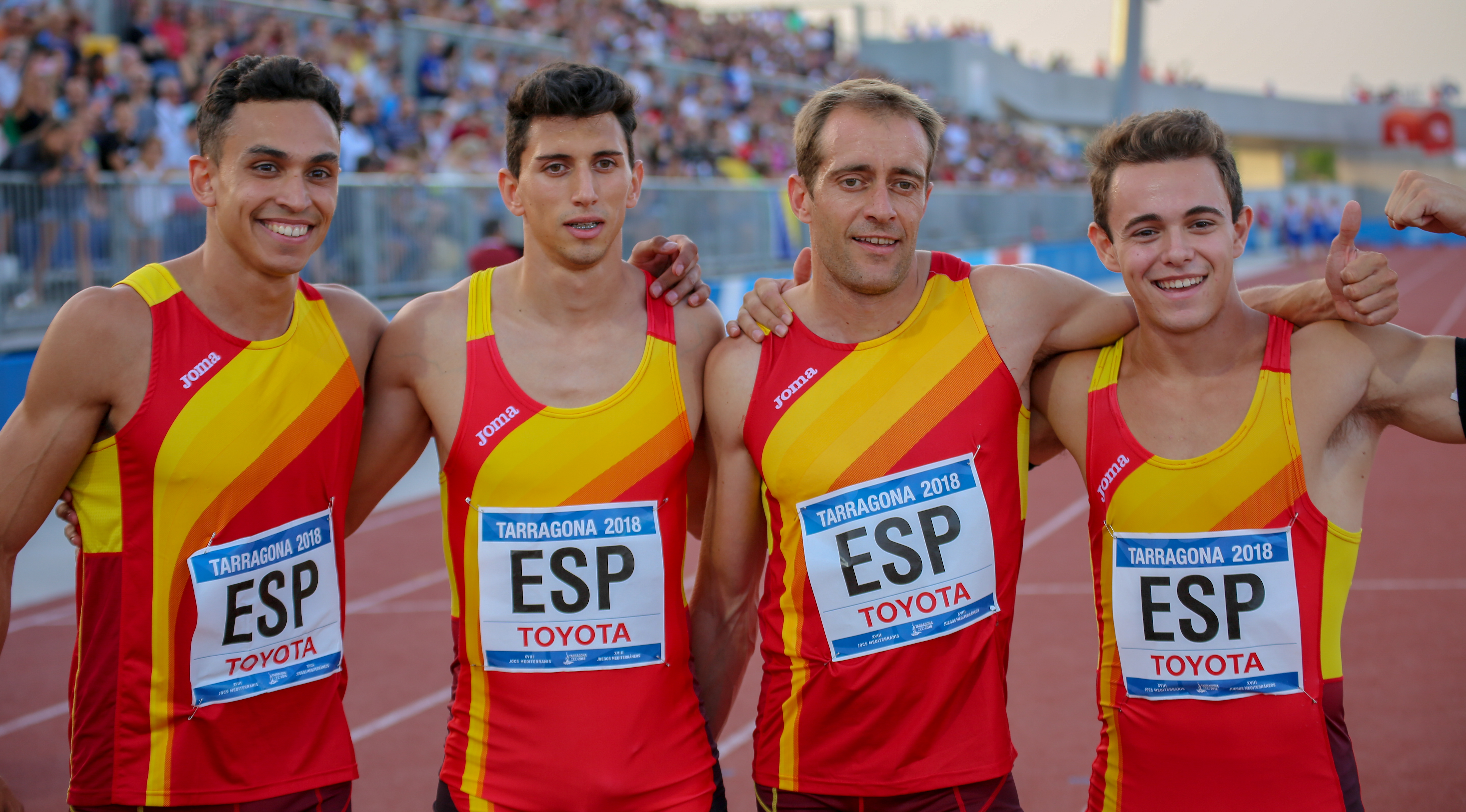 España en los relevos 4x100 en los Juegos del Mediterráneo 2018 (Javier Troyano, Ángel David Rodríguez, Daniel Rodríguez, Arián Téllez)